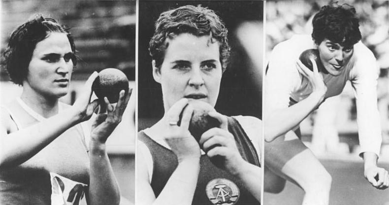 Gerda Uhmann, Margitta Gummel, Maritta Lange Zentralbild Koch(2) -Ahnert 19.09.1968 Berlin: DDR-Teilnehmer der XIX. Olympischen Sommerspiele vom 12. -27.10.1968 in Mexiko-Stadt. Leichtathletik-Frauen: vlnr:Gerda Uhmann (SC Einheit Dresden) , Margitta Gummel (SC DHfK Leipzig) und Maritta Lange (SC Chemie Halle) .